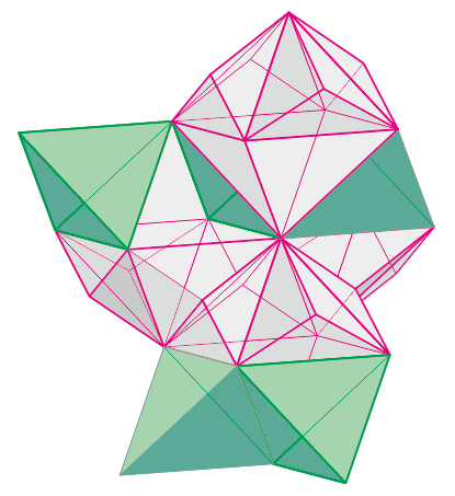 一酸化鉛型